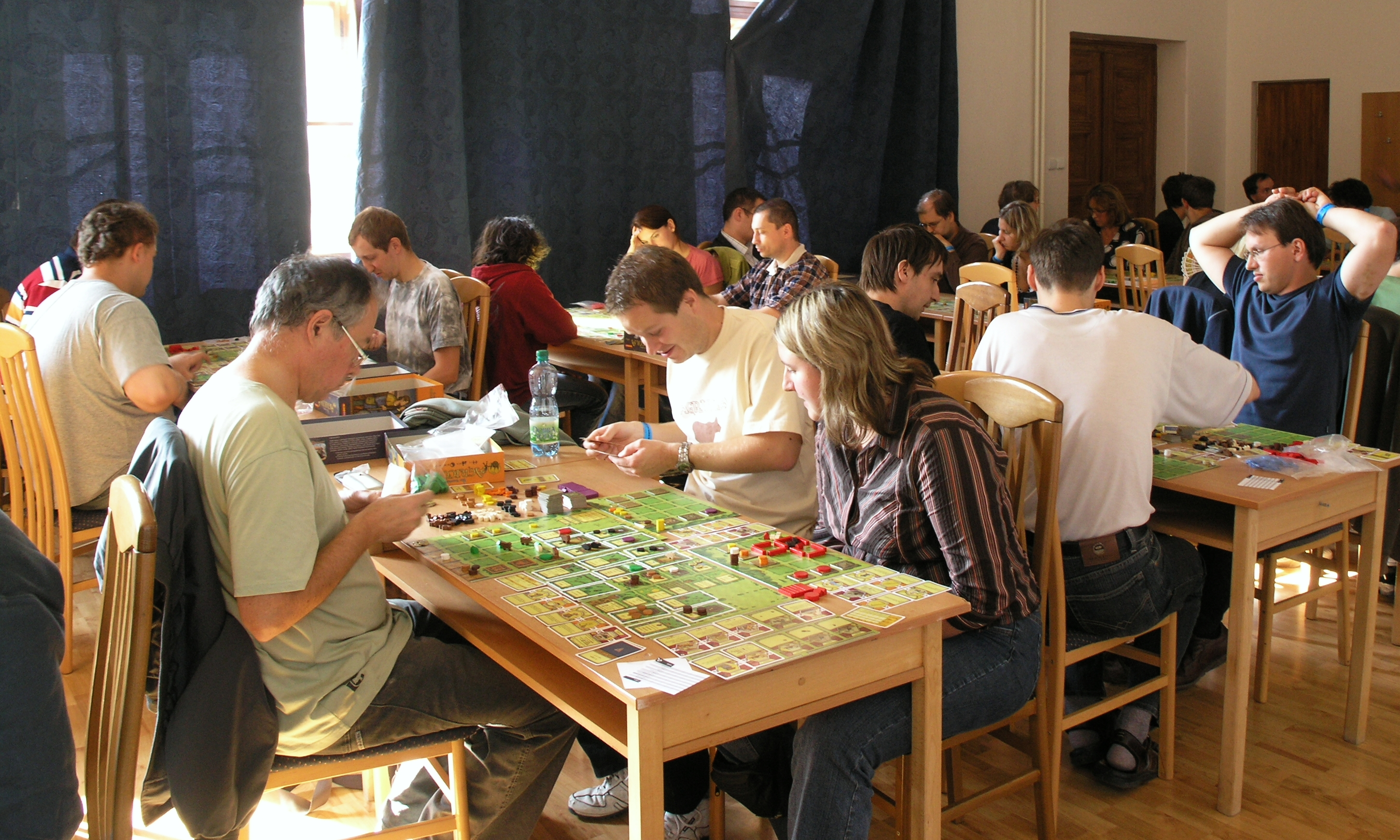 Deskohraní 2009